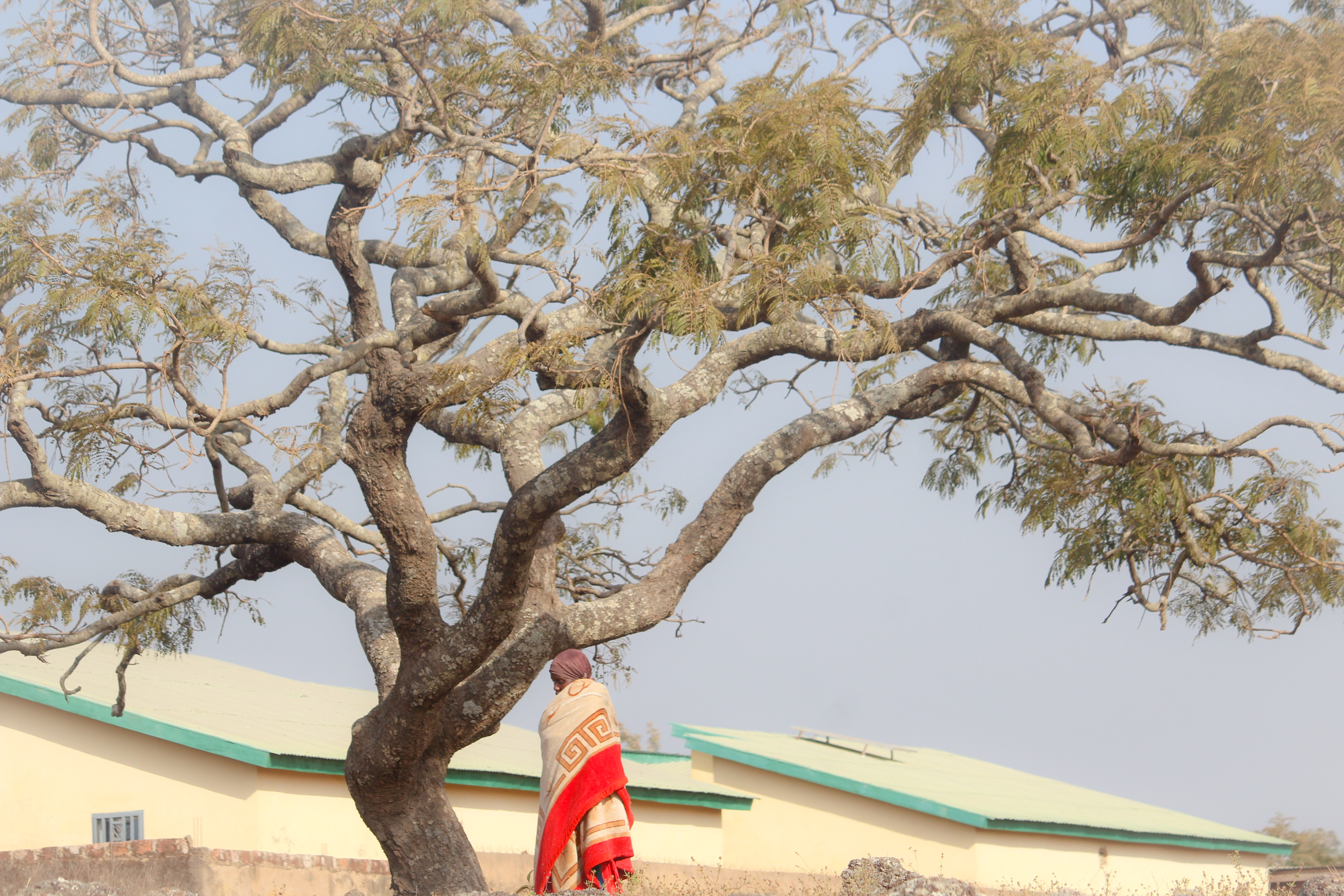 Un habitant de Mali (ville) sous la lumière de soleil pour ce réchauffé contre la fraicheur